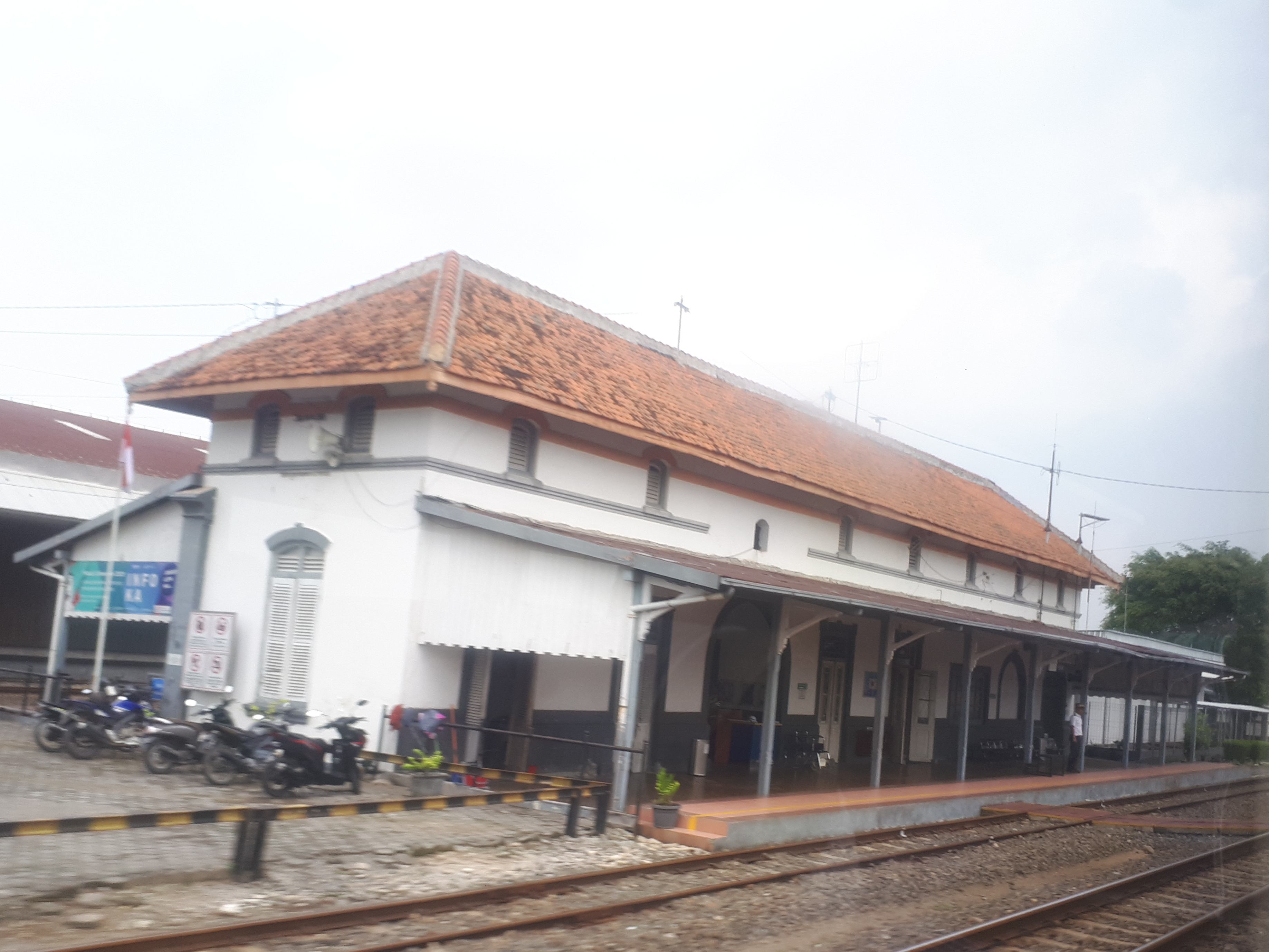 Stasiun Brumbung tahun 2020. Stasiun ini merupakan salah satu stasiun kereta api pertama di Indonesia